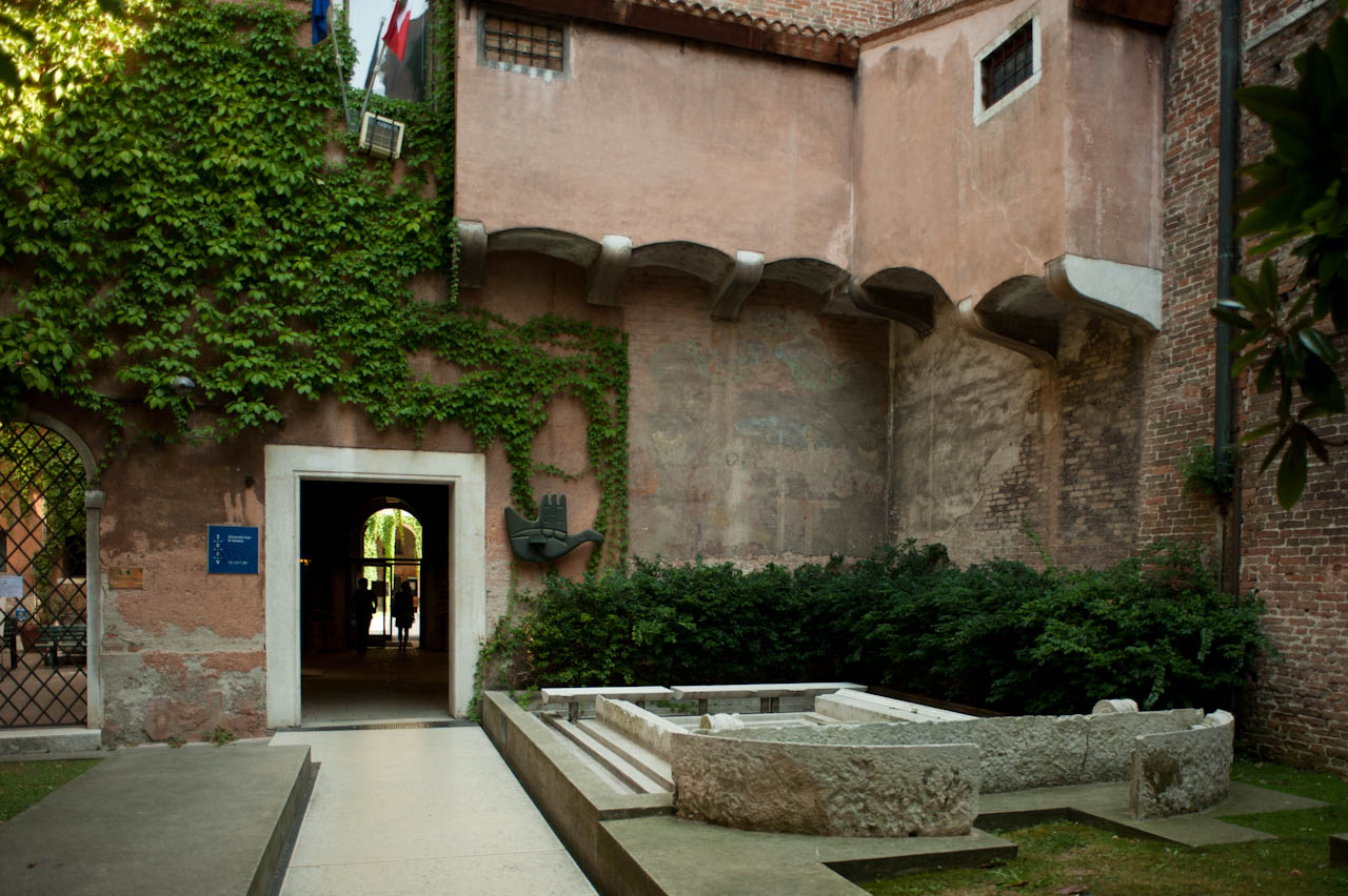 Ingresso della Facoltà di Architettura_IUAV Carlo Scarpa 1966-1985 Venezia Italy 2011-08-31